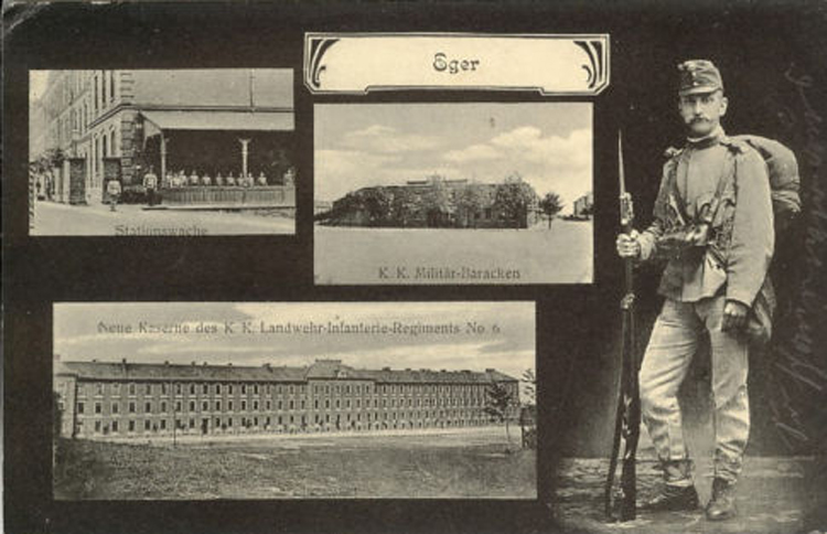 k.k. Landwehrkaserne in Eger in Böhmen